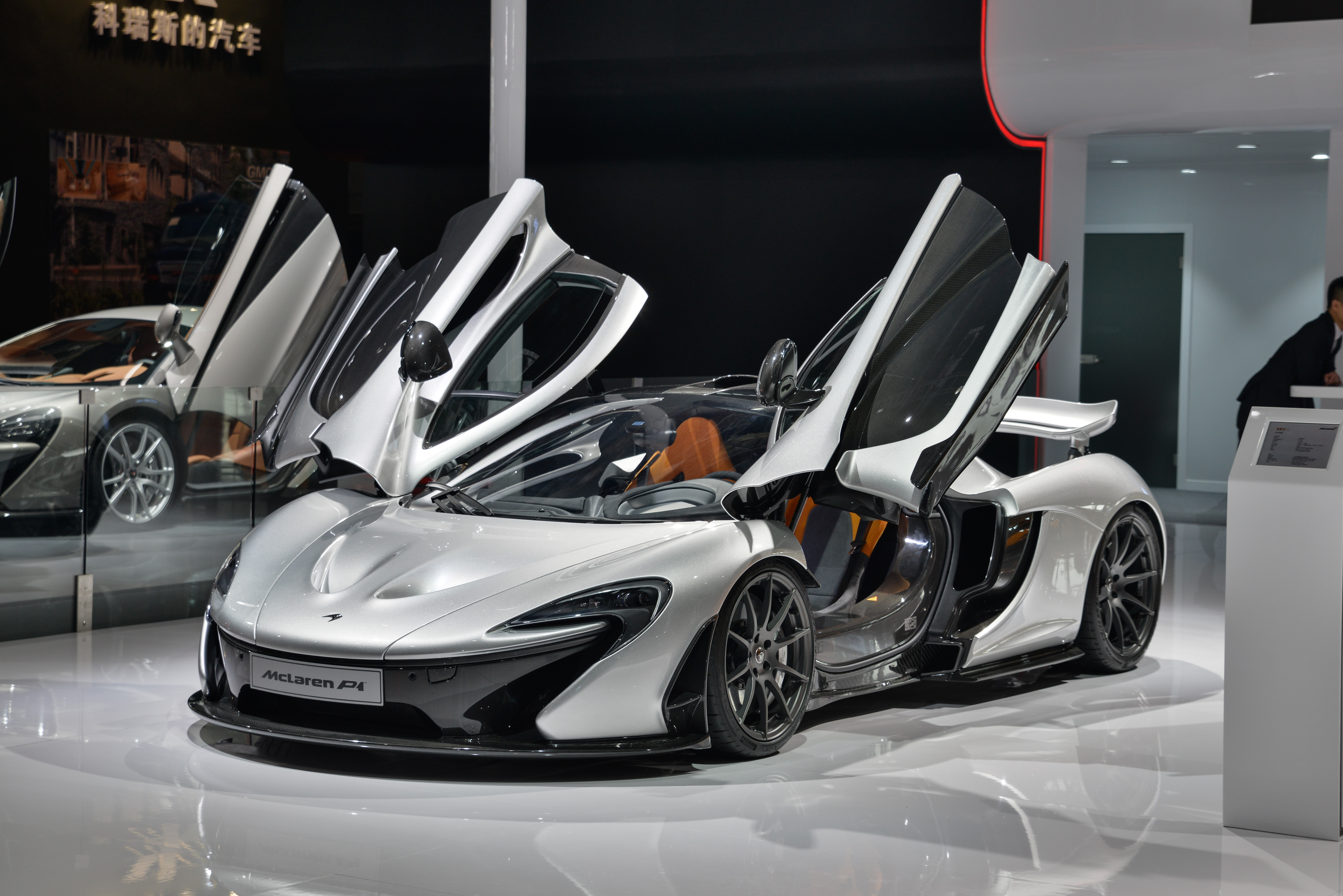 McLaren P1 Auto Shanghai 2015